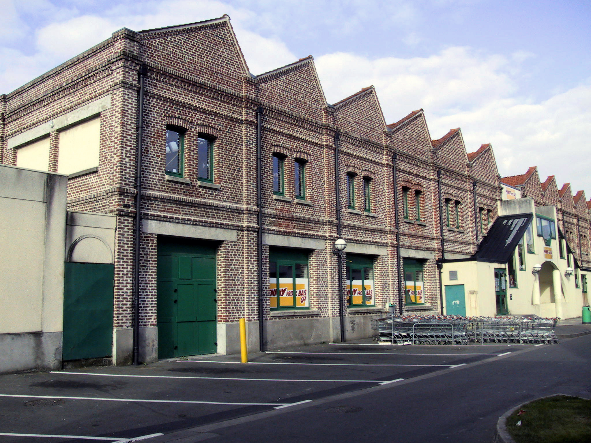 L'ancienne corderie d'Etaples